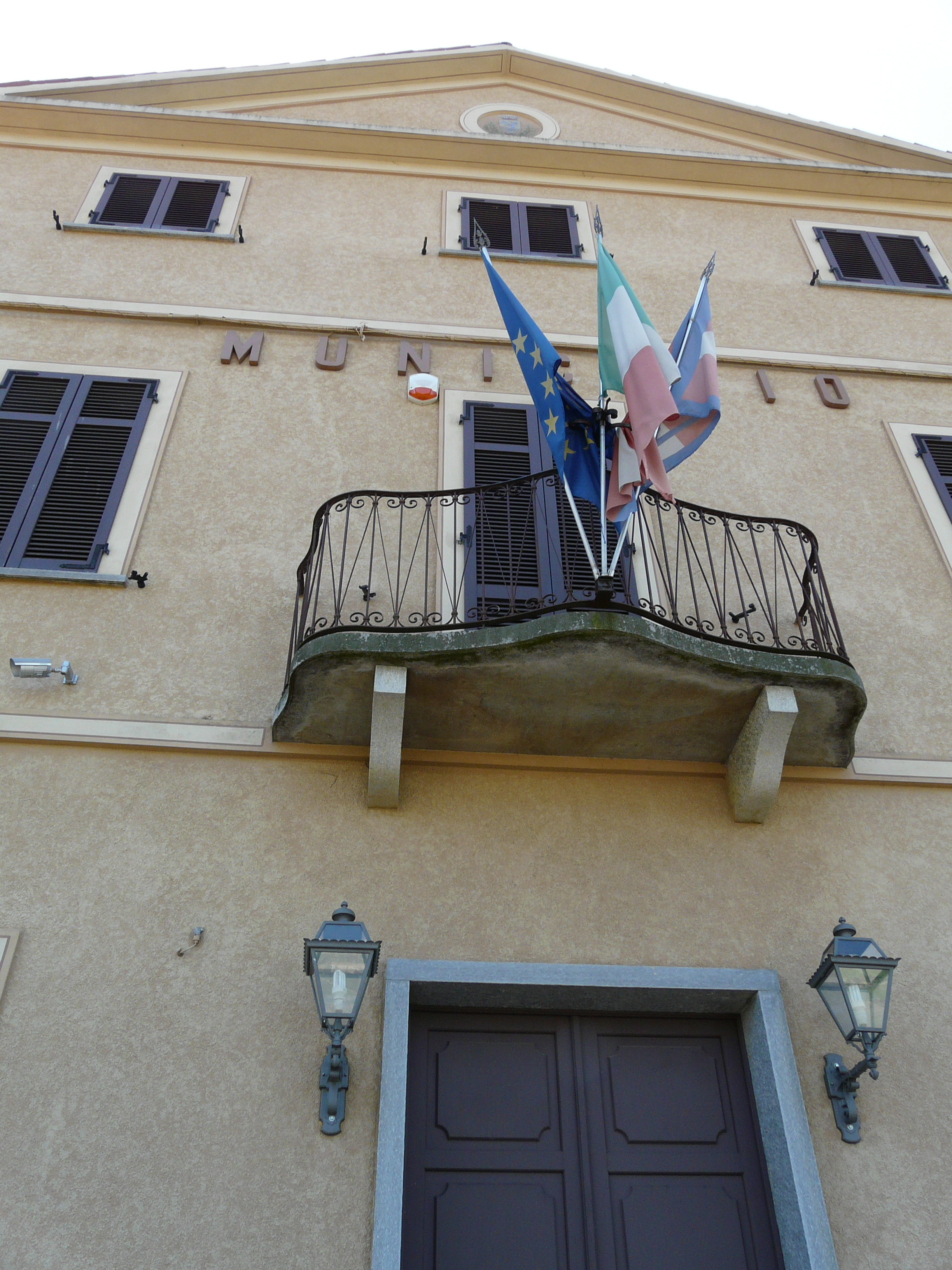 Municipio, Lu, Piemonte, Italia